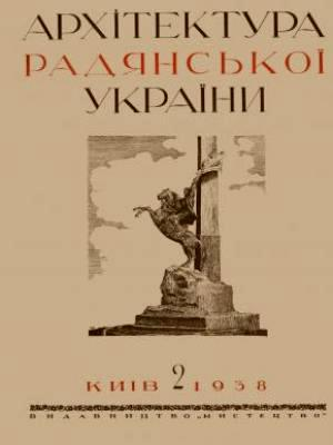 Журнал "Архітектура Радянської України" № 2 за 1938 год